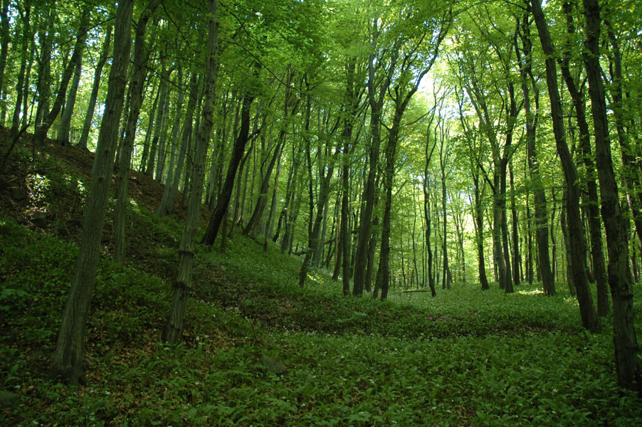 Jakab-hegy őskori sánc